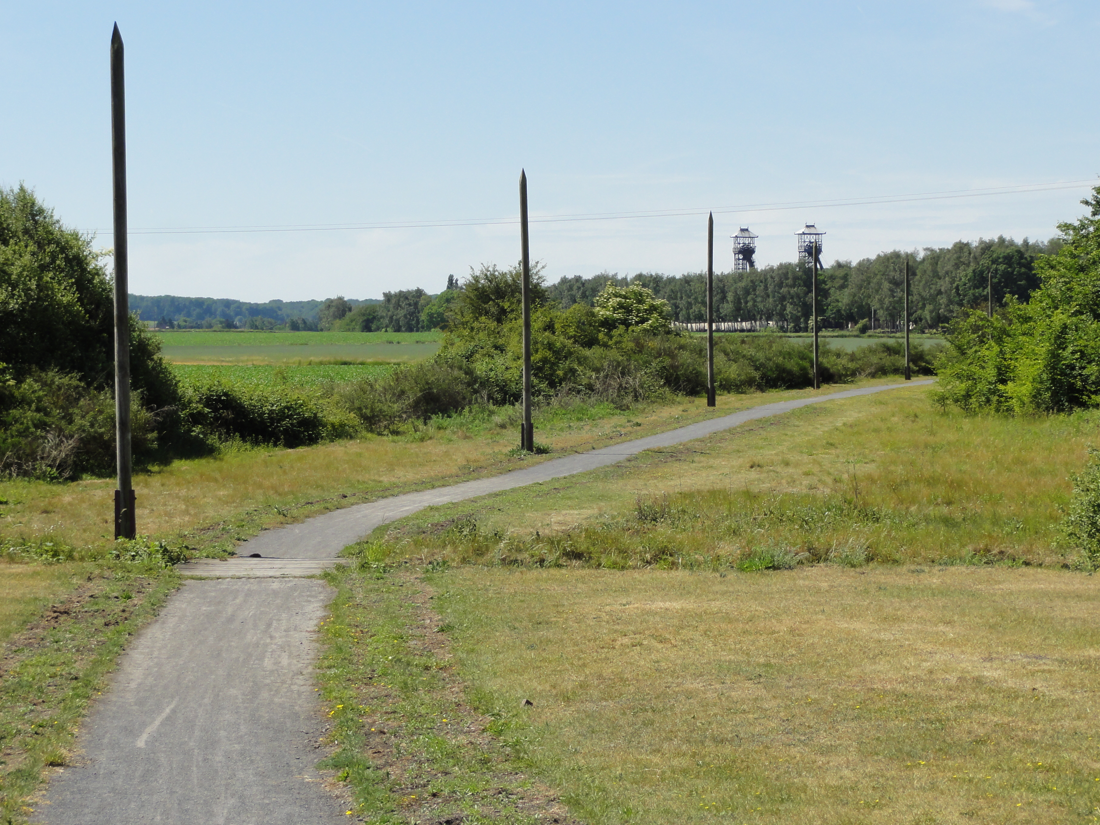 Terril n° 220 dit Cavalier Delloye Sud, Fosse Delloye de la Compagnie des mines d'Aniche, Lewarde, Nord, Nord-Pas-de-Calais, France.